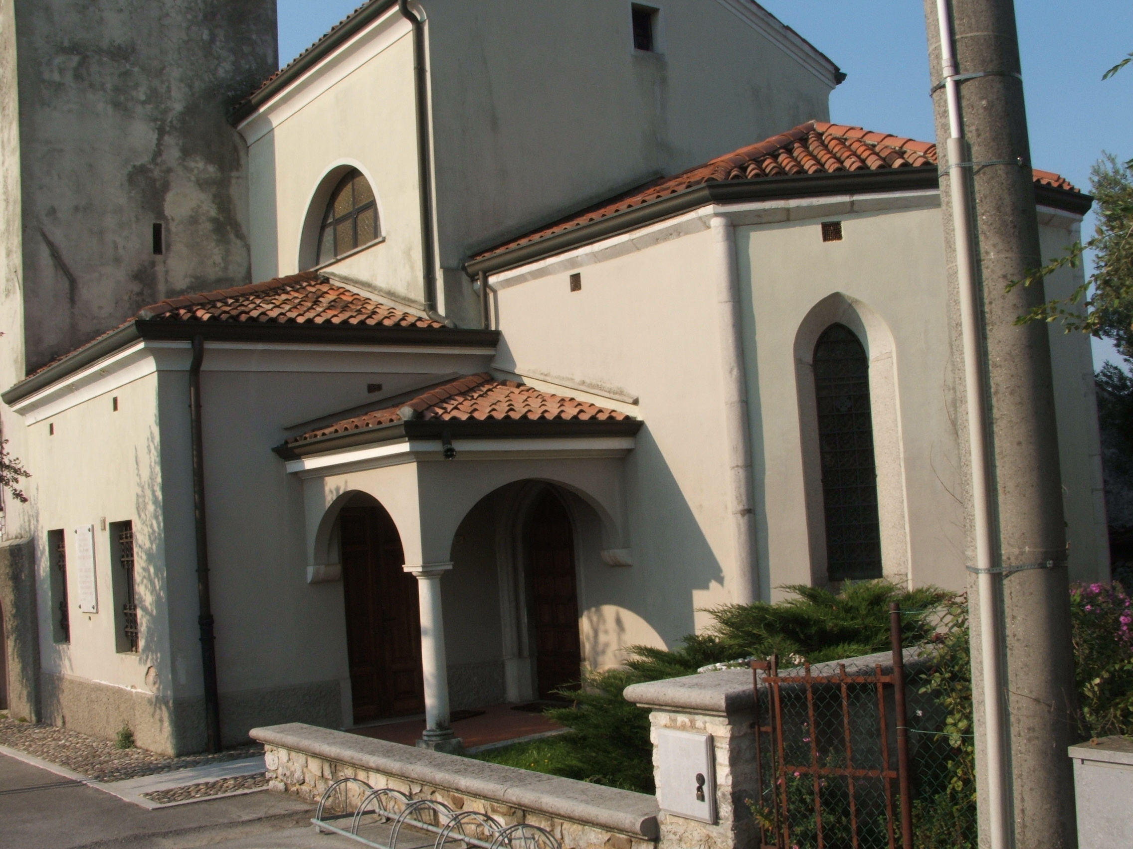 autore:Andrejdros